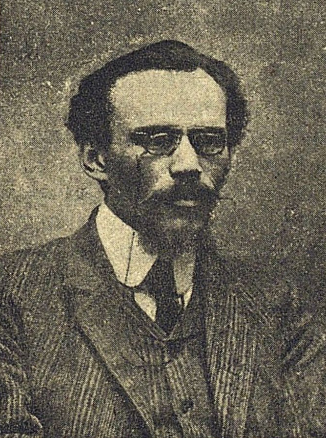 Ivan Jakovlevič Žilin tra il 1908 e il 1910 durante l'emigrazione in Belgio